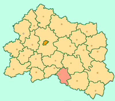 Orel Oblast map by Al Silonov Карта районов Орловской области